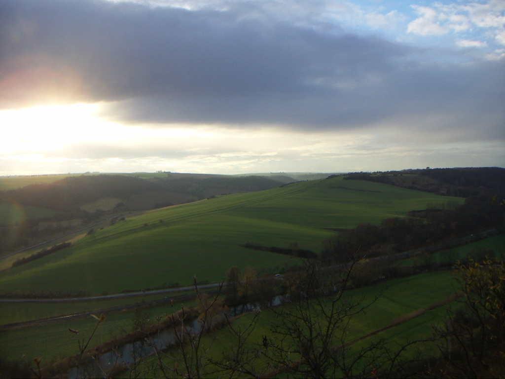 Sonnenuntergang und Aussicht vom Feengrotten-Kyffhäuser-Fernwanderweg aus in der Nähe von Freyburg